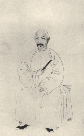 清代学者。